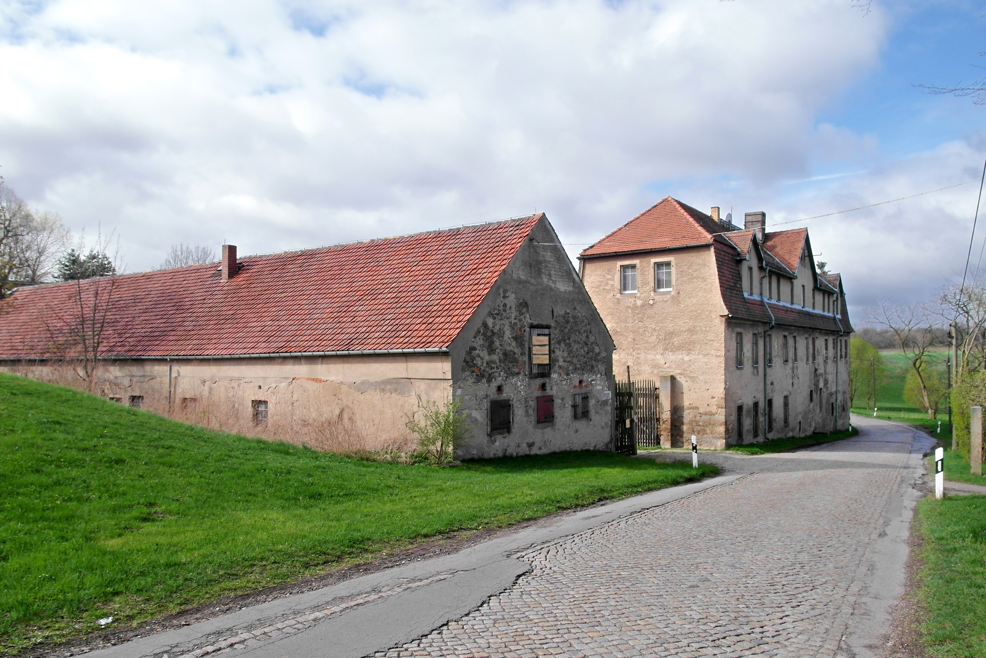 06.04.2017 02627 Jeßnitz im Gebirge (Kubschütz), Jeßnitz 1: Rittergut und Herrenhaus Jeßnitz. Das Gut war immer in bürgerlichen Händen. Ab 1945 zunächst Volksgut "Fritz Joß", später dem Volksgut Pommritz angeschlossen. Hier Privatbesitz. Straßenseite von Nordosten. [SAM9108.JPG]20170406115DR.JPG(c)Blobelt Hornjoserbsce: Knježi dwór w Jaseńcy (Kubšičanska gmejna); napohlad ze sewjerowuchoda